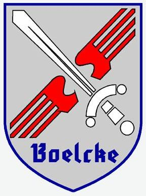 Das Wappen des Jagdbombergeschwaders 31 "Boelcke" in Nörvenich